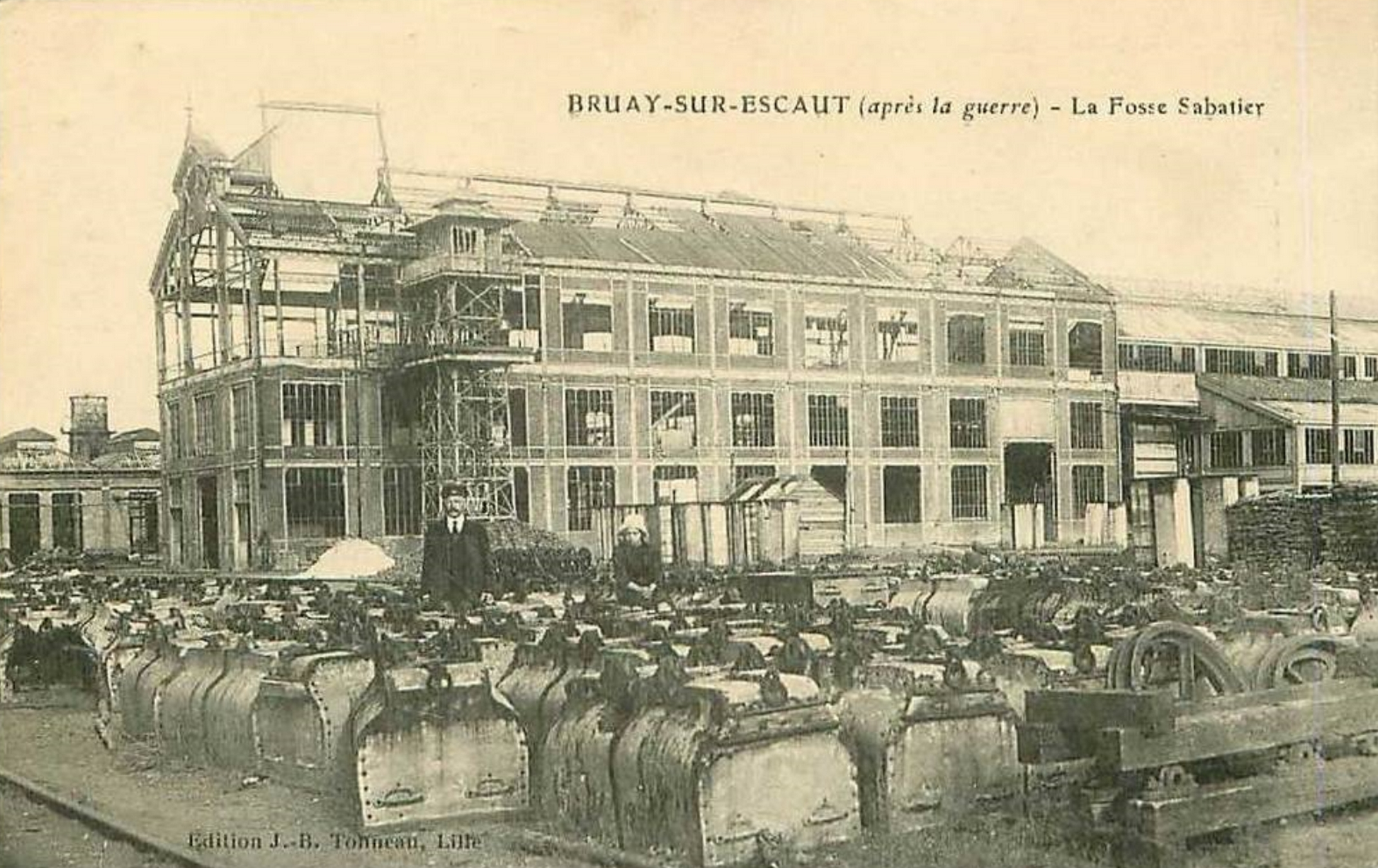 La fosse Sabatier de la Compagnie des mines d'Anzin était un charbonnage constitué de deux puits situé à Raismes, Nord, Nord-Pas-de-Calais, France.